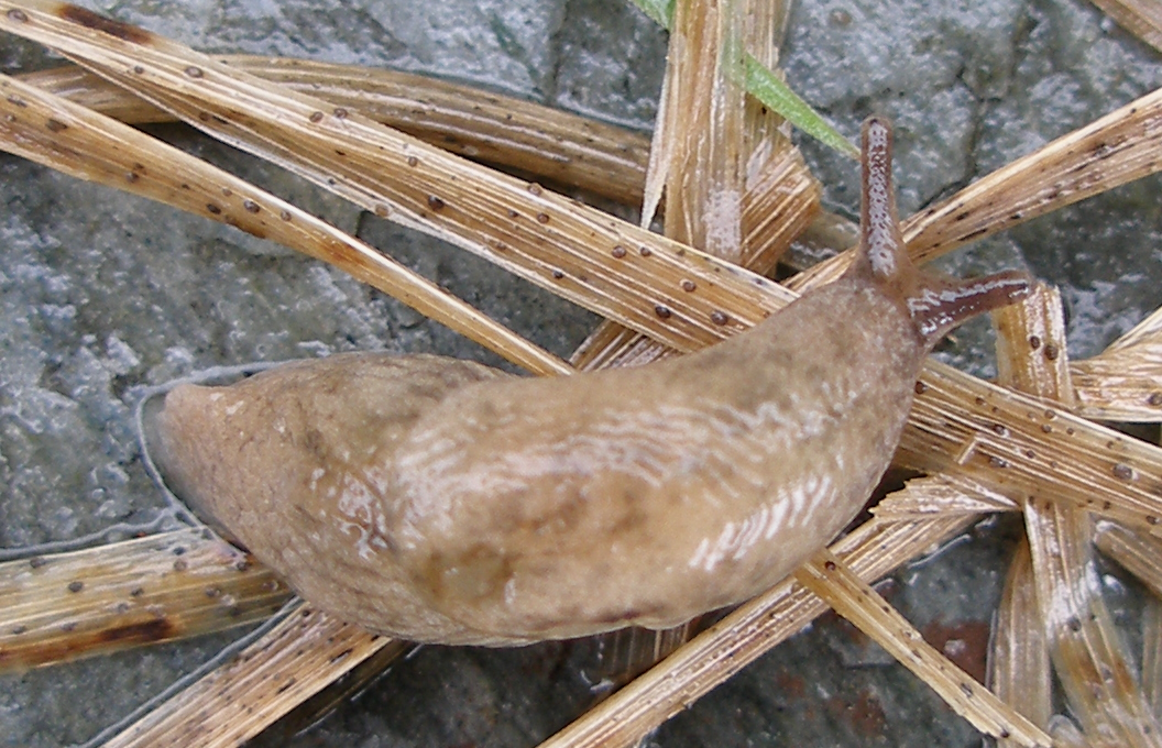 Living Slug on dead grass on "skifer" (norwegian word) flat stone. Picture taken in Leikanger, Sogn og fjordane, Norway.